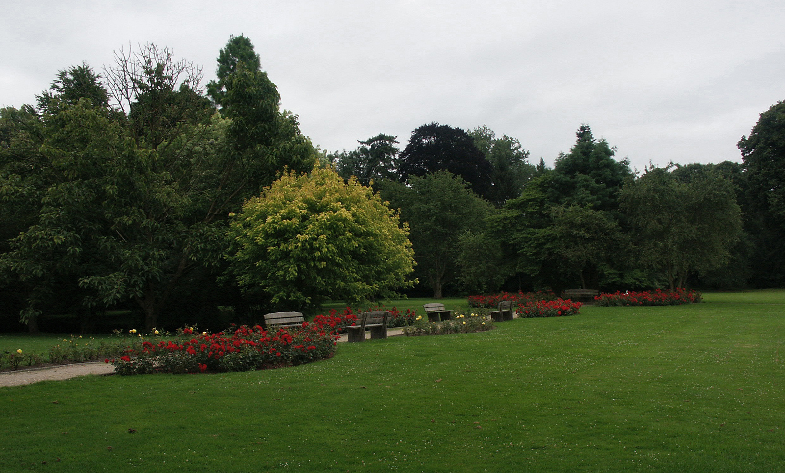 Reste des Barockgartens von Schloss Trips in Geilenkirchen